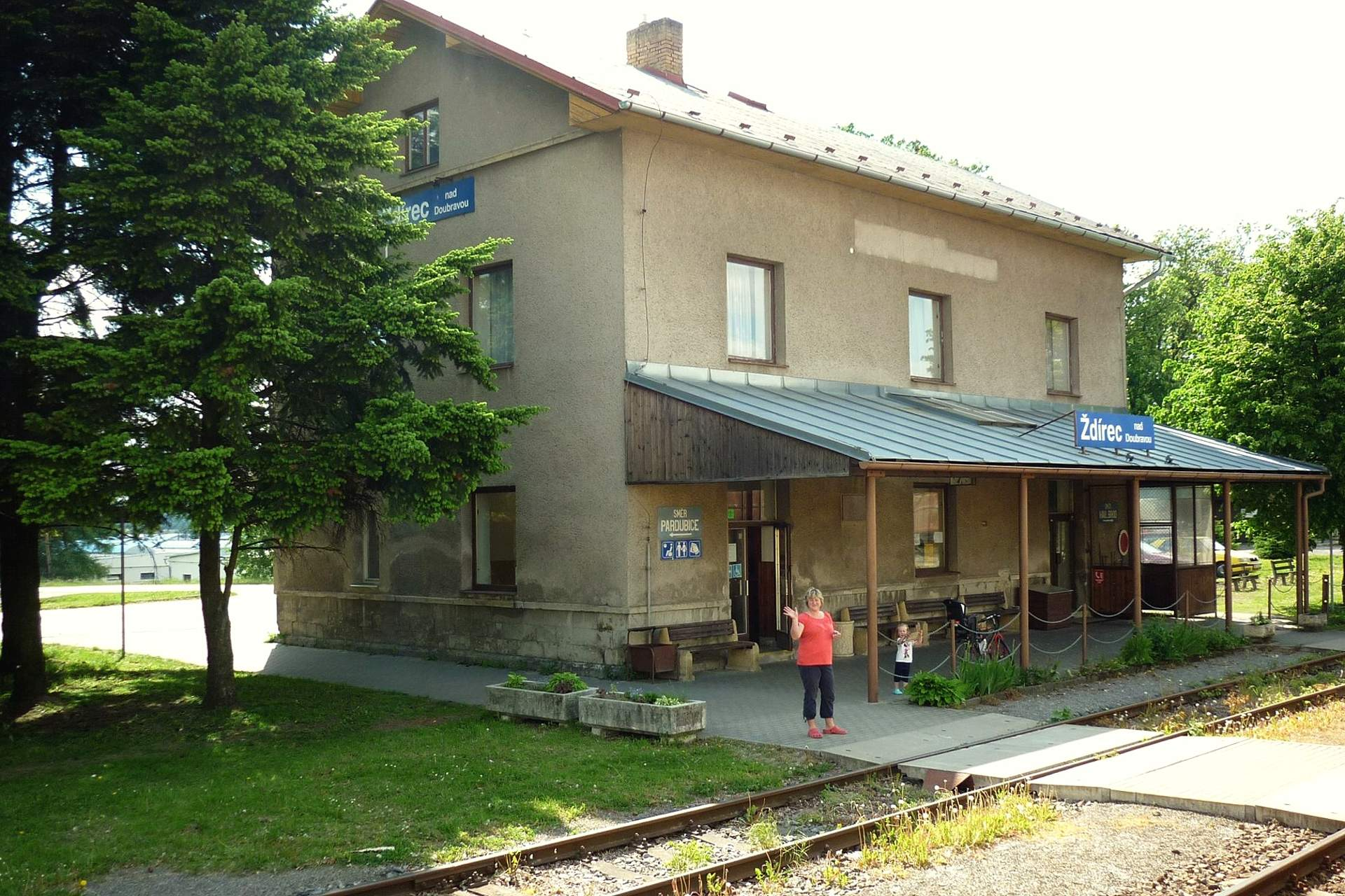 Ždírec nad Doubravou - vlakové nádraží